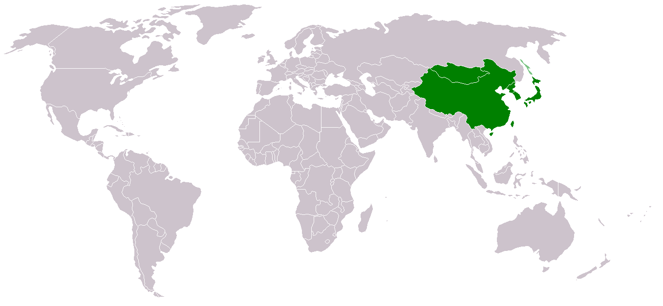 东亚范围示意图